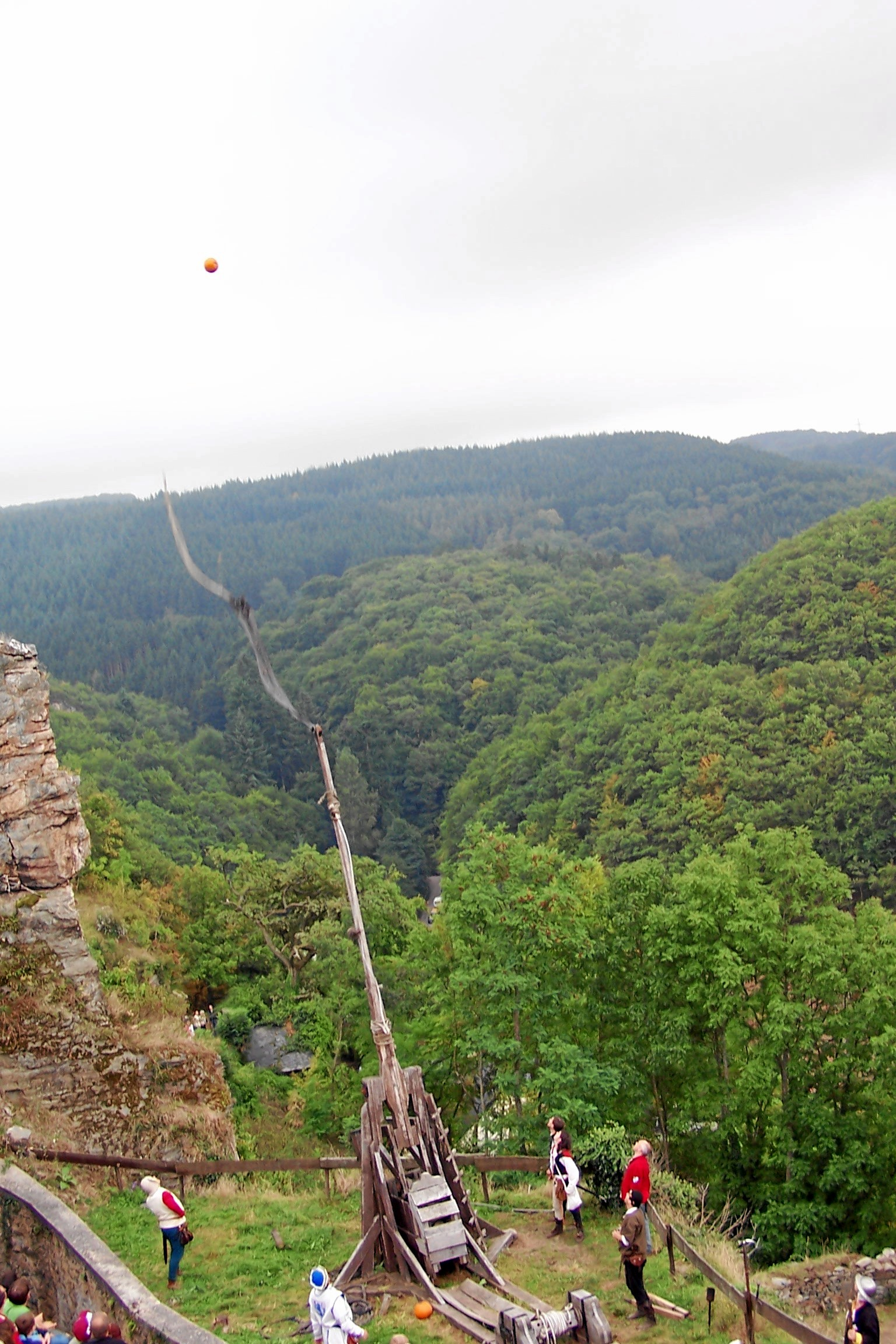 Trebuchet in Schloss Veldenz in Aktion